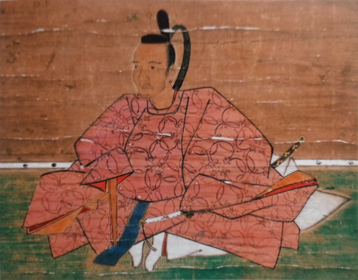 市橋長政の肖像。